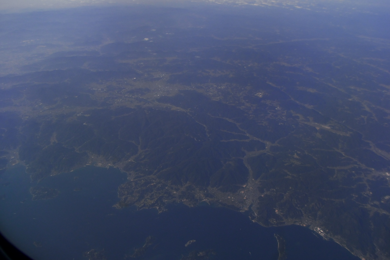 羽田発熊本行きの機内から撮影。 瀬戸内辺り、竹原市周辺の鳥瞰。手前に竹原港、阿波島などが見える。